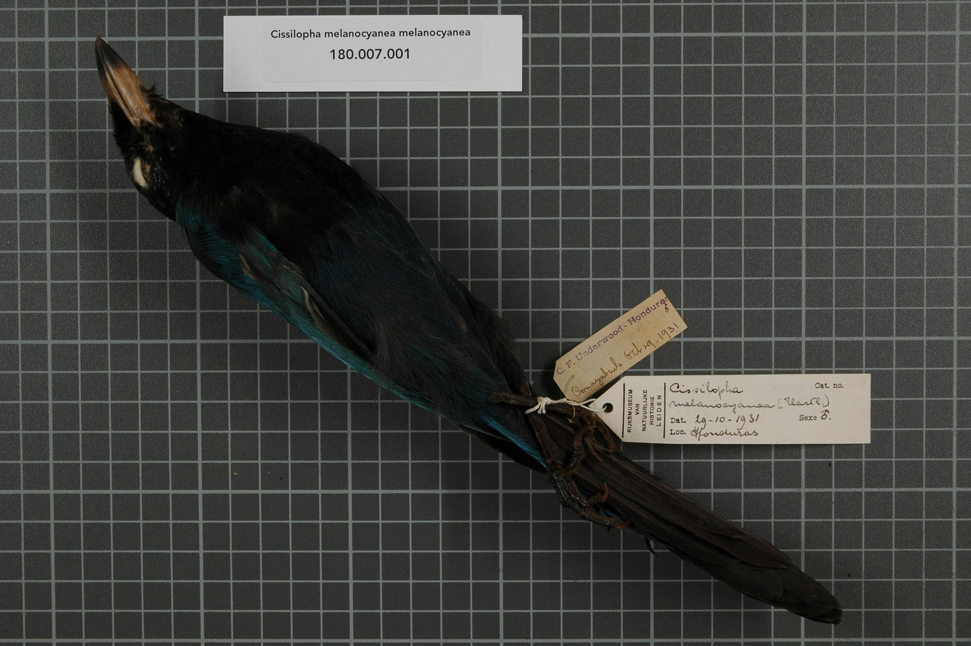 Cissilopha melanocyanea melanocyanea (Hartlaub, 1844)